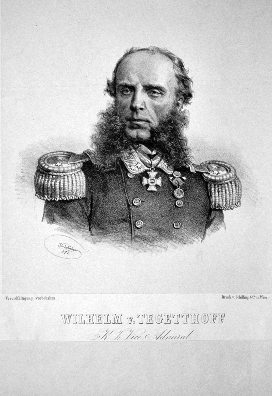 Wilhelm Freiherr von Tegetthoff (1827-1871), k. k. Vice-Admiral, Lithographie von Josef Kriehuber, 1872